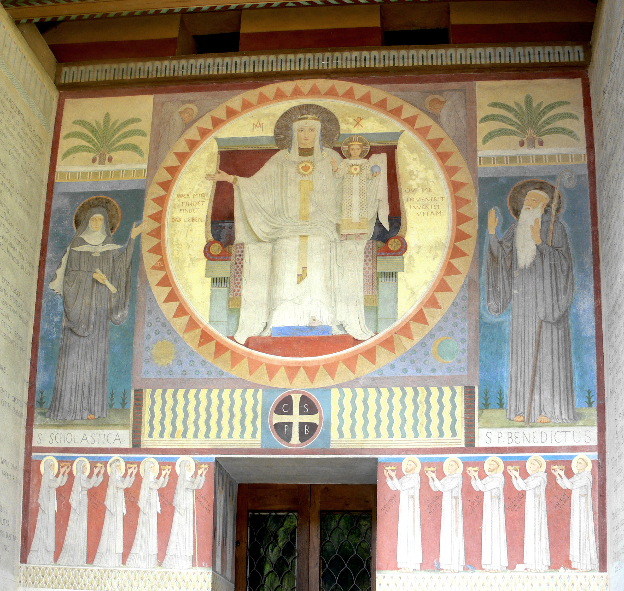 St.-Maurus-Kapelle, Beuron (Donautal), erbaut 1868–1870, Architekt: Desiderius Lenz Gabriel Wüger: Fassadenbild Thronende Muttergottes in der Glorie